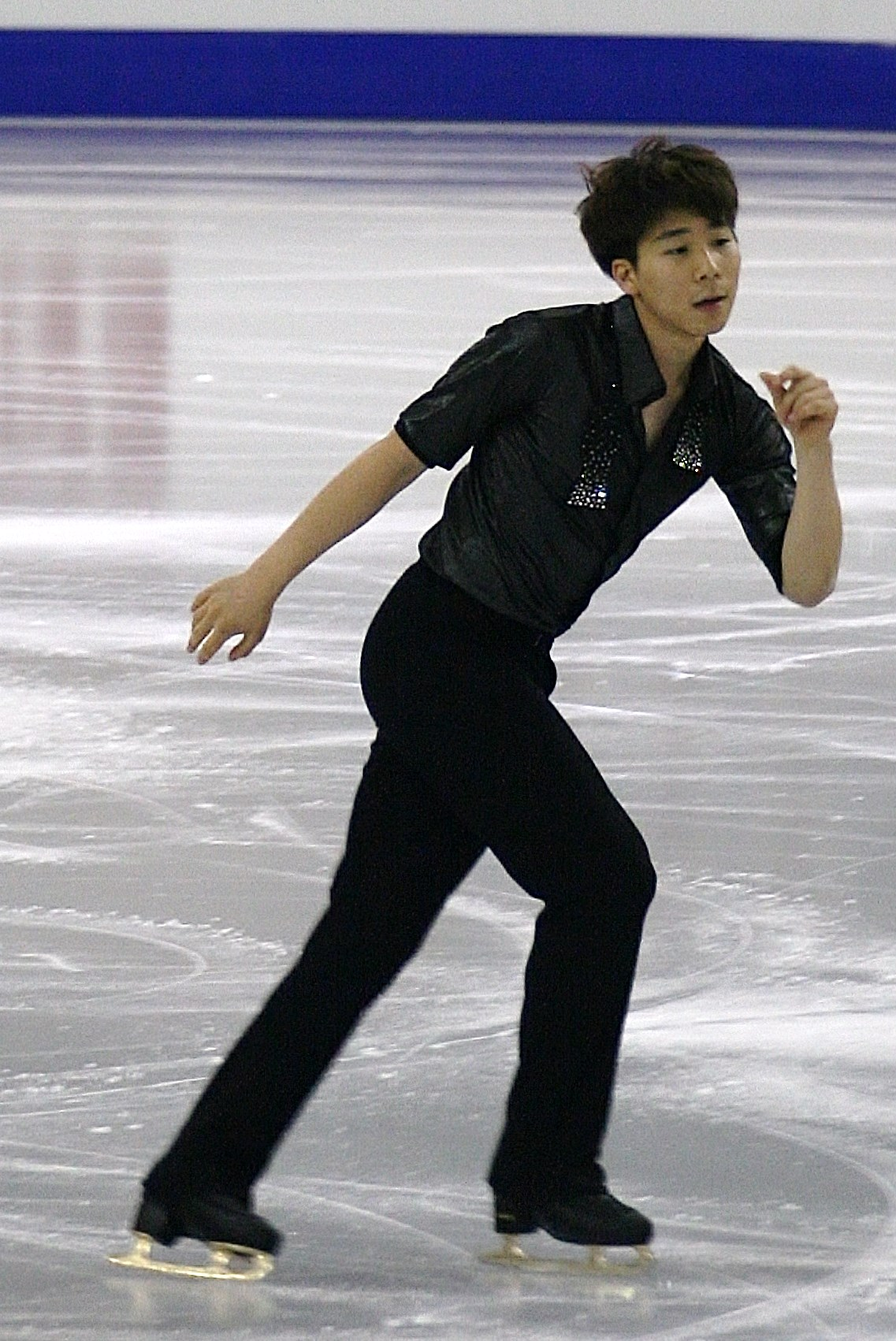 Ли Джун Хен (Южная Корея) на финале Гран-при среди юниоров 2014-2015.